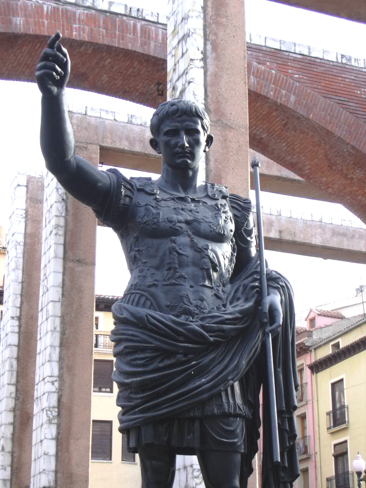 Zaragoza - Estatua del Emperador Augusto, copia del siglo XX de la escultura romana llamada Prima Porta.